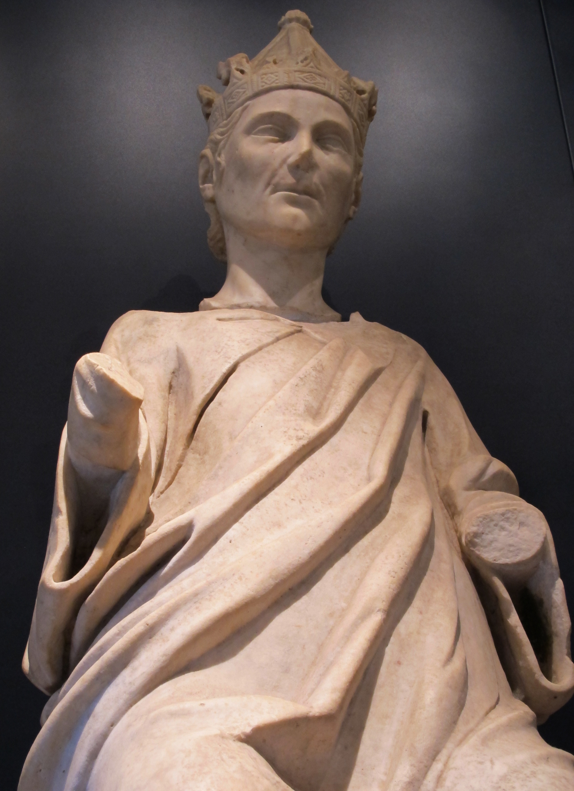 Tino di camaino, statue dal monumento funebre di arrigo VII di lussemburgo, 1313